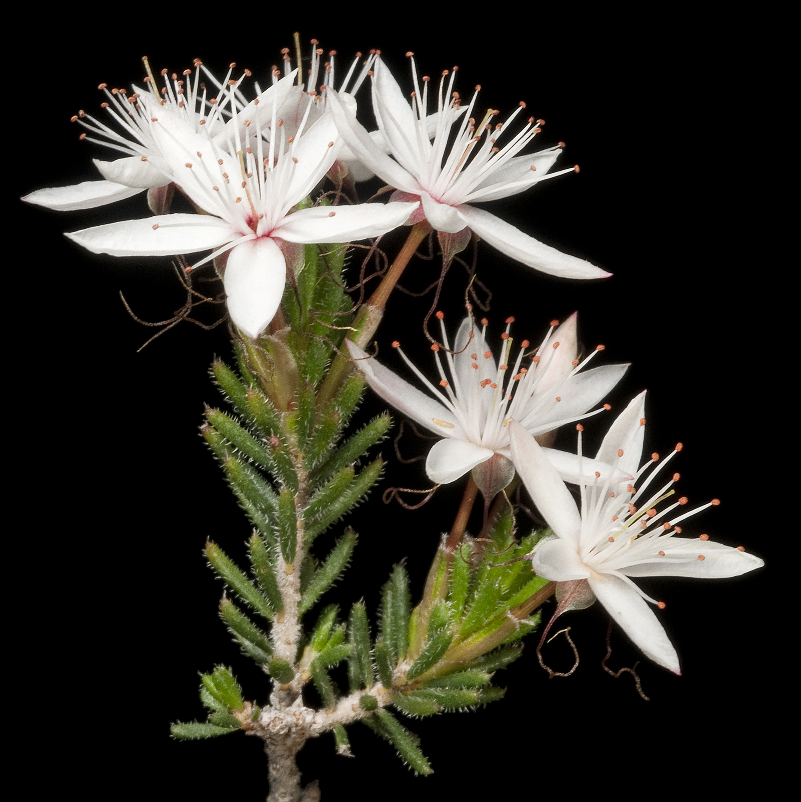 WAH551